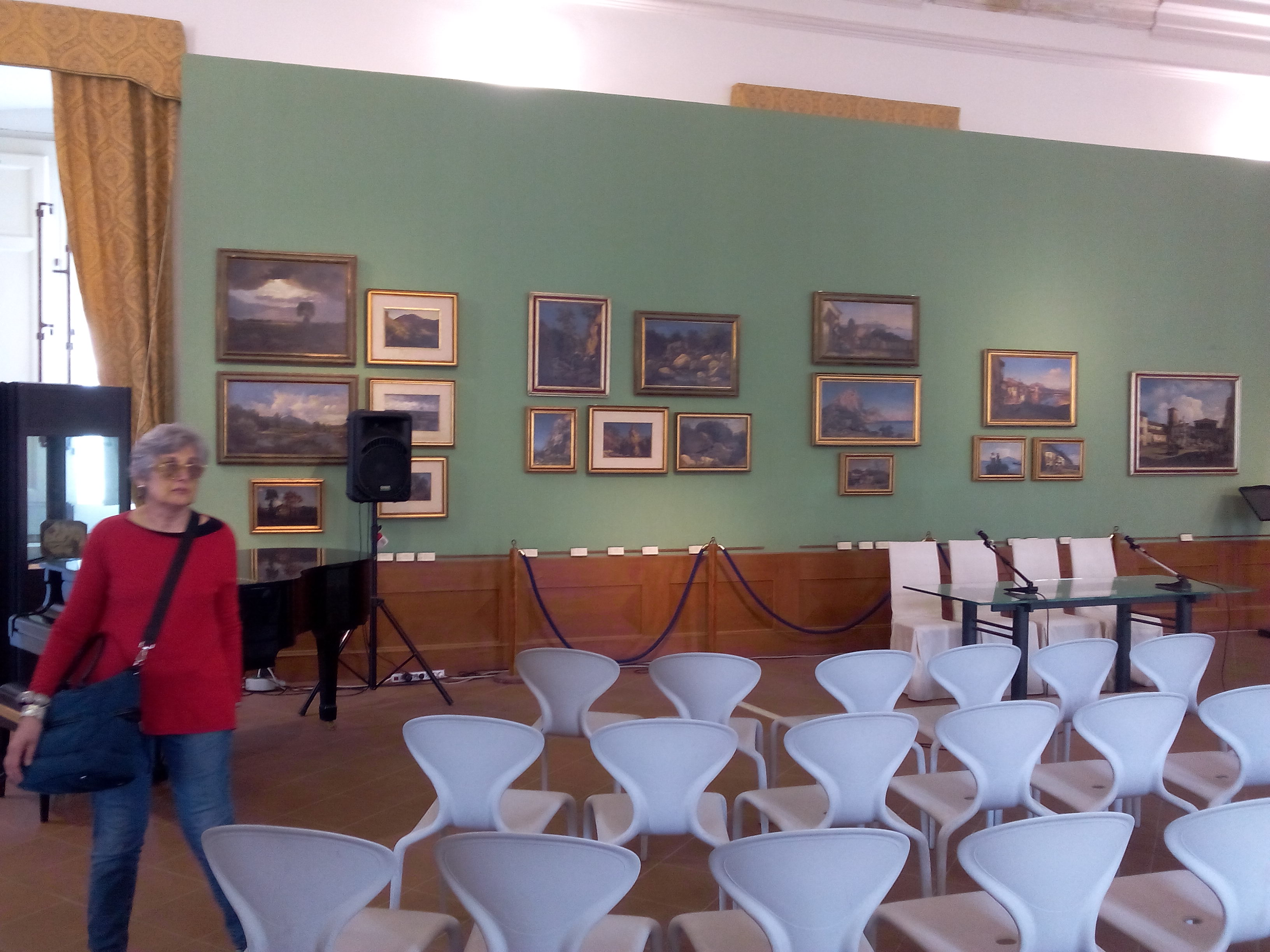 Sala Nicola Palizzi, ingresso Pinacoteca dei Musei Civici di Vasto